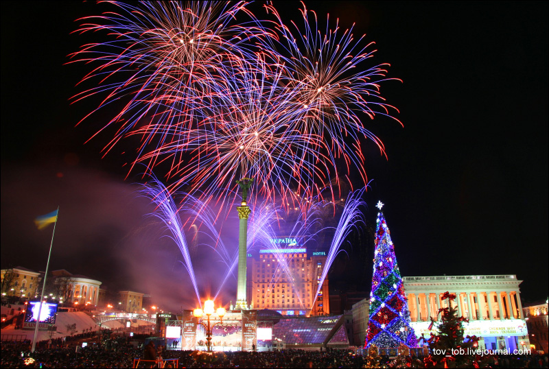 Празднование Нового Года на Майдане Незалежности в Киеве